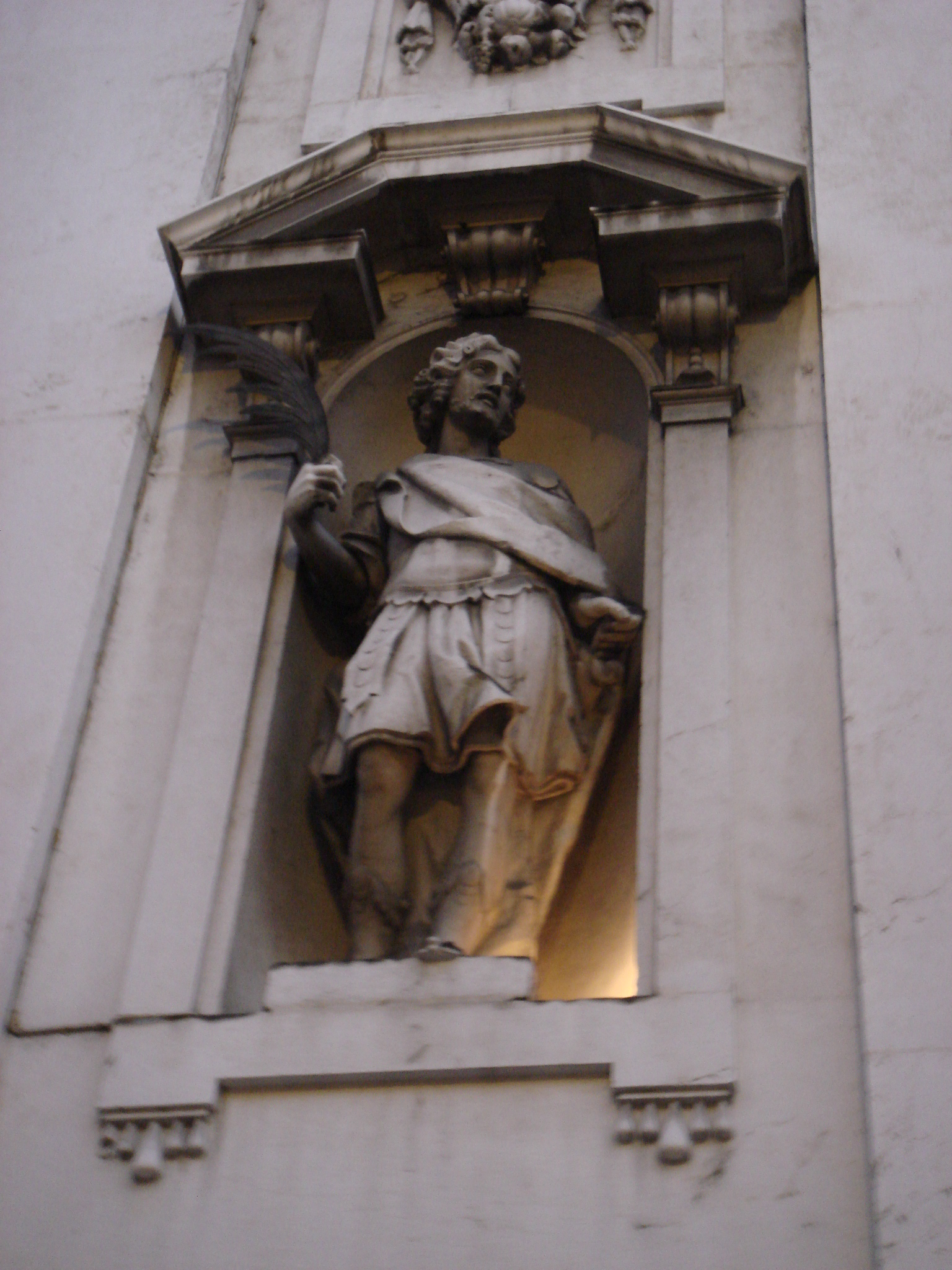 San Faustino maggiore (Brescia). Facciata, nicchia a destra del portale, statua di San Giovita di Sante Calegari il Vecchio (1662-1717).